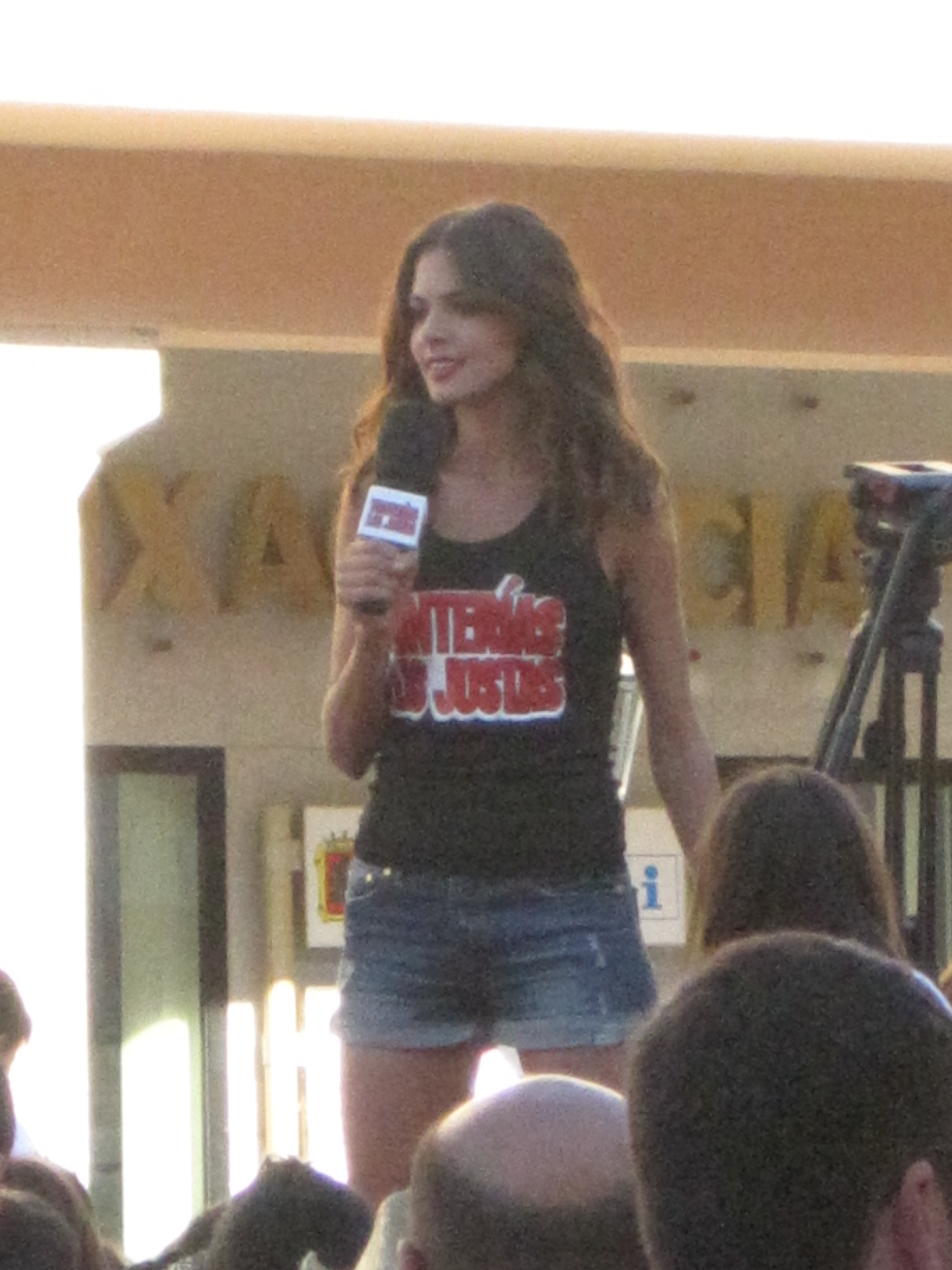 Romina Belluscio durante la "macrogamba" celebrada en Astorga (León, España) en agosto de 2010.